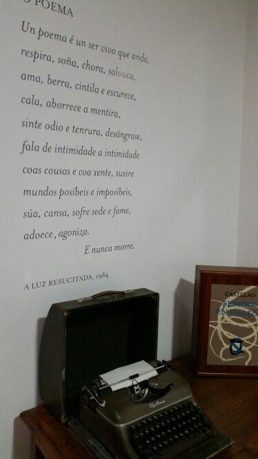 Máquina de escribir que se conserva na Casa Museo Manuel María.